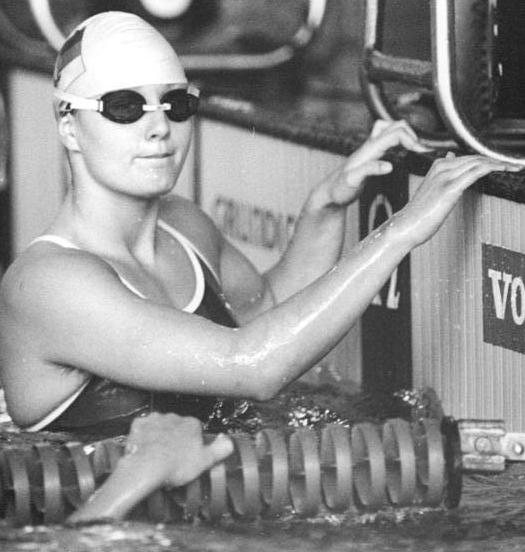 Dresden, Schwimmerin Daniela Hunger ADN-Hiekel 26.5.90 Dresden-Schwimmen-Am dritten Wettkampftag der DDR-Meisterschaften im Schwimmen siegte Daniela Hunger (1. SC Berlin) in der 50-Meter-Freistil-Distanz mit 26,27. Abgebildete Personen: Hunger, Daniela: Schwimmerin, DDR